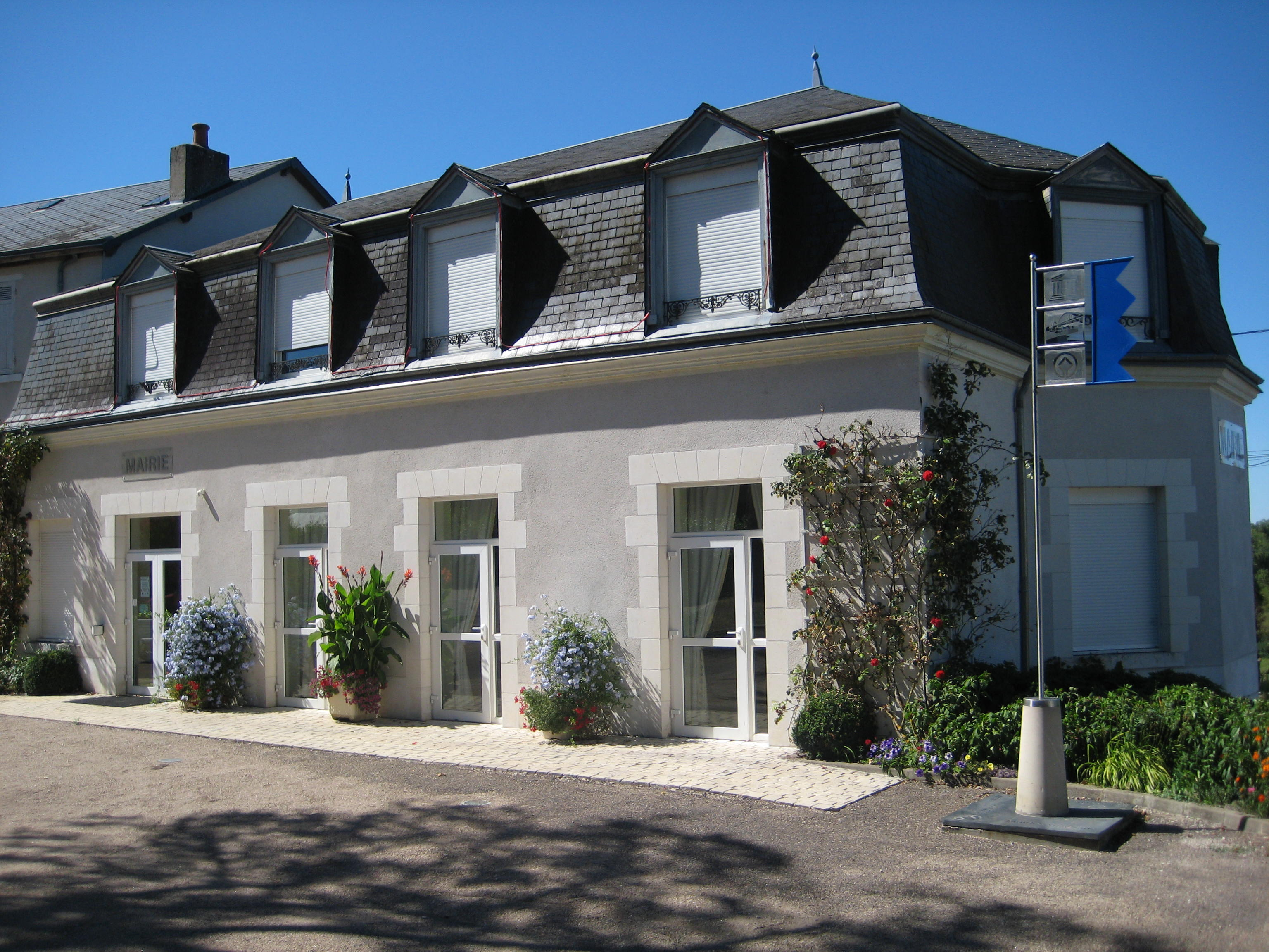 Photographie du château de la Cressonnière qui est devenue l'actuelle mairie. Photographie prise en août 2010